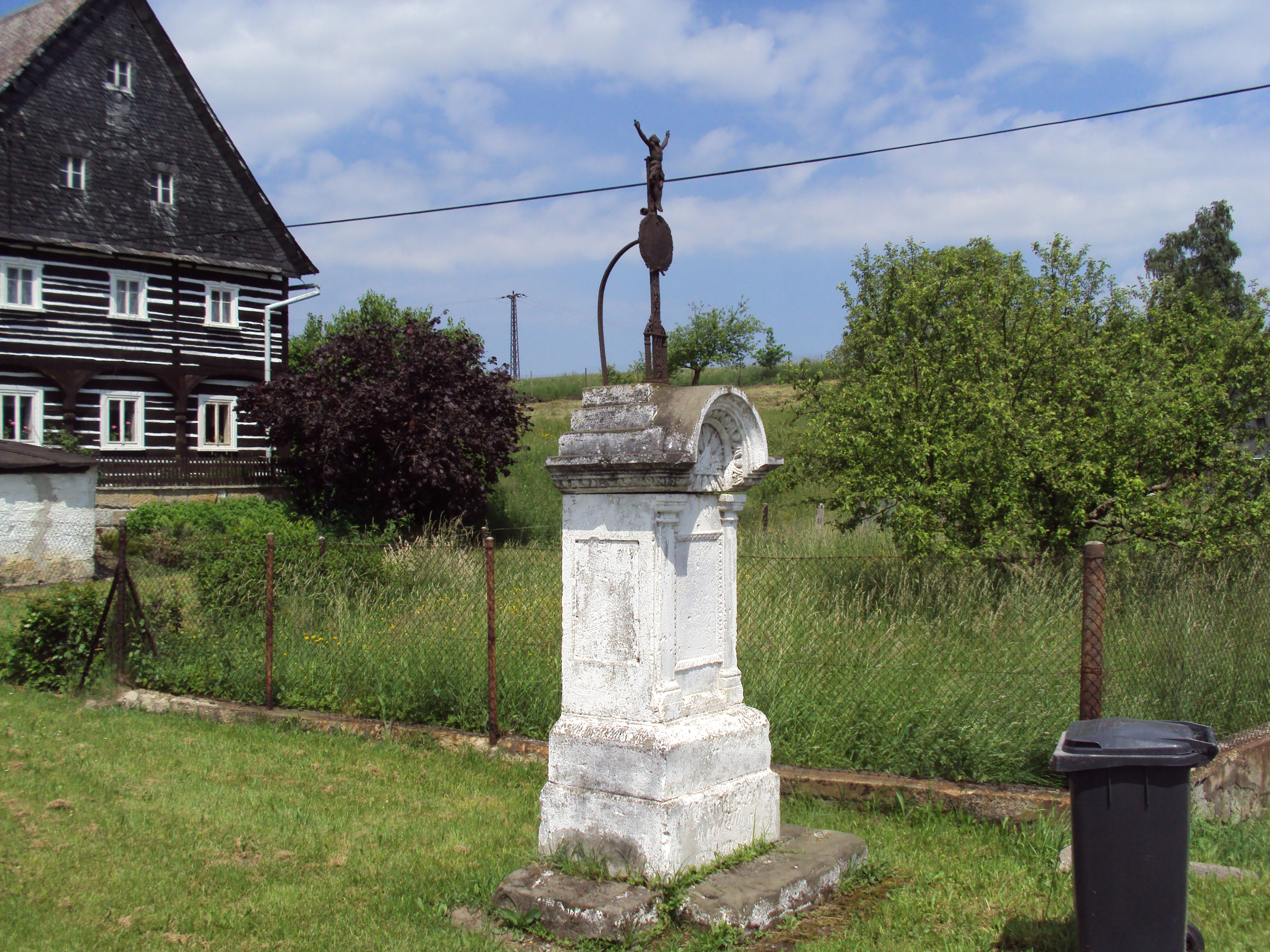 Křížek bez popisu v Zákupech Božíkově u hlavní silnice